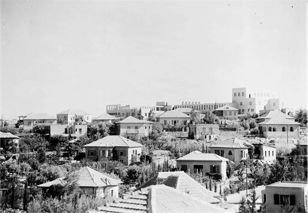 ירושלים - שכונת בית הכרם.